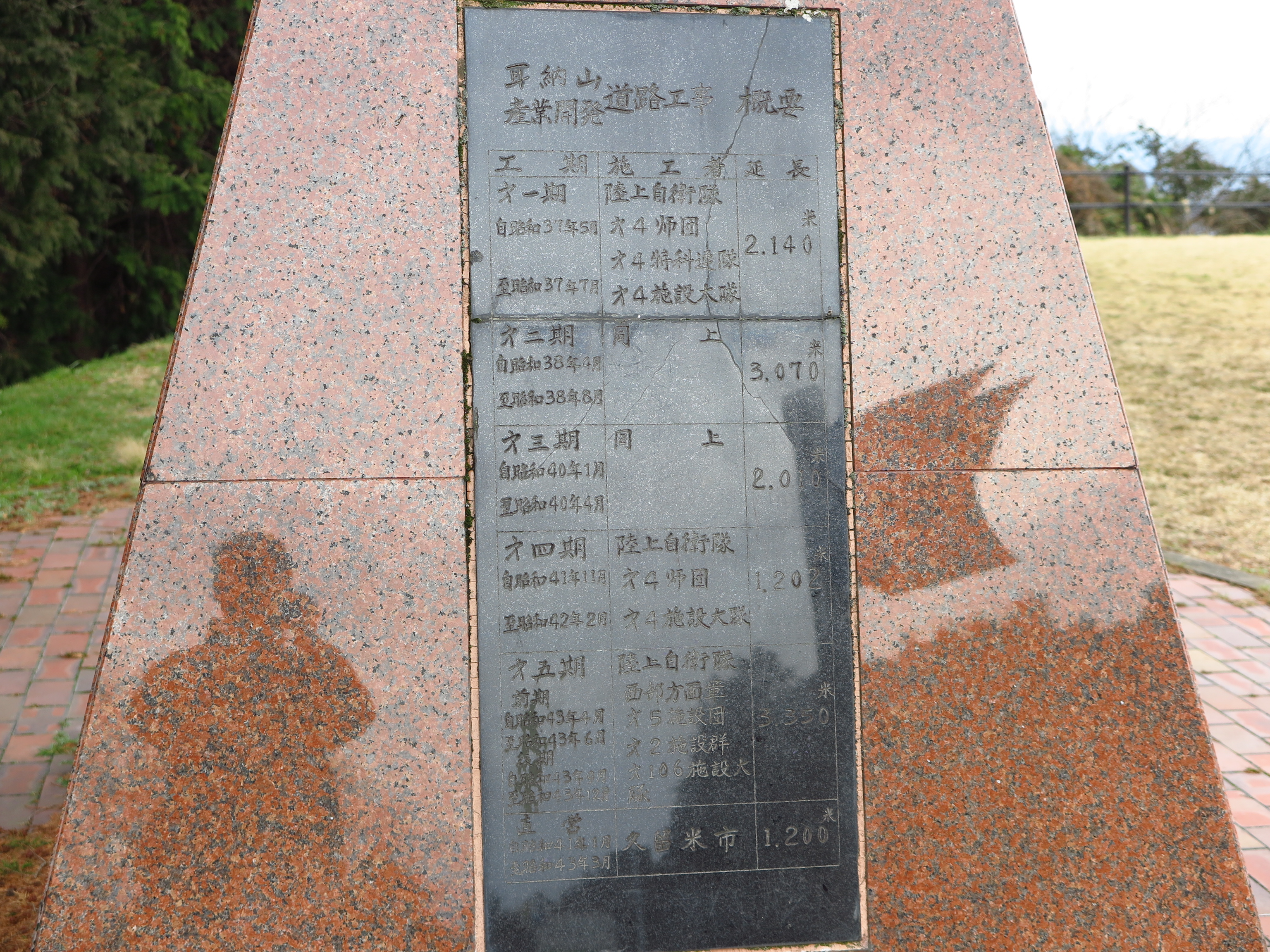 耳納スカイライン 耳納平駐車場に設置されている記念碑の建設史